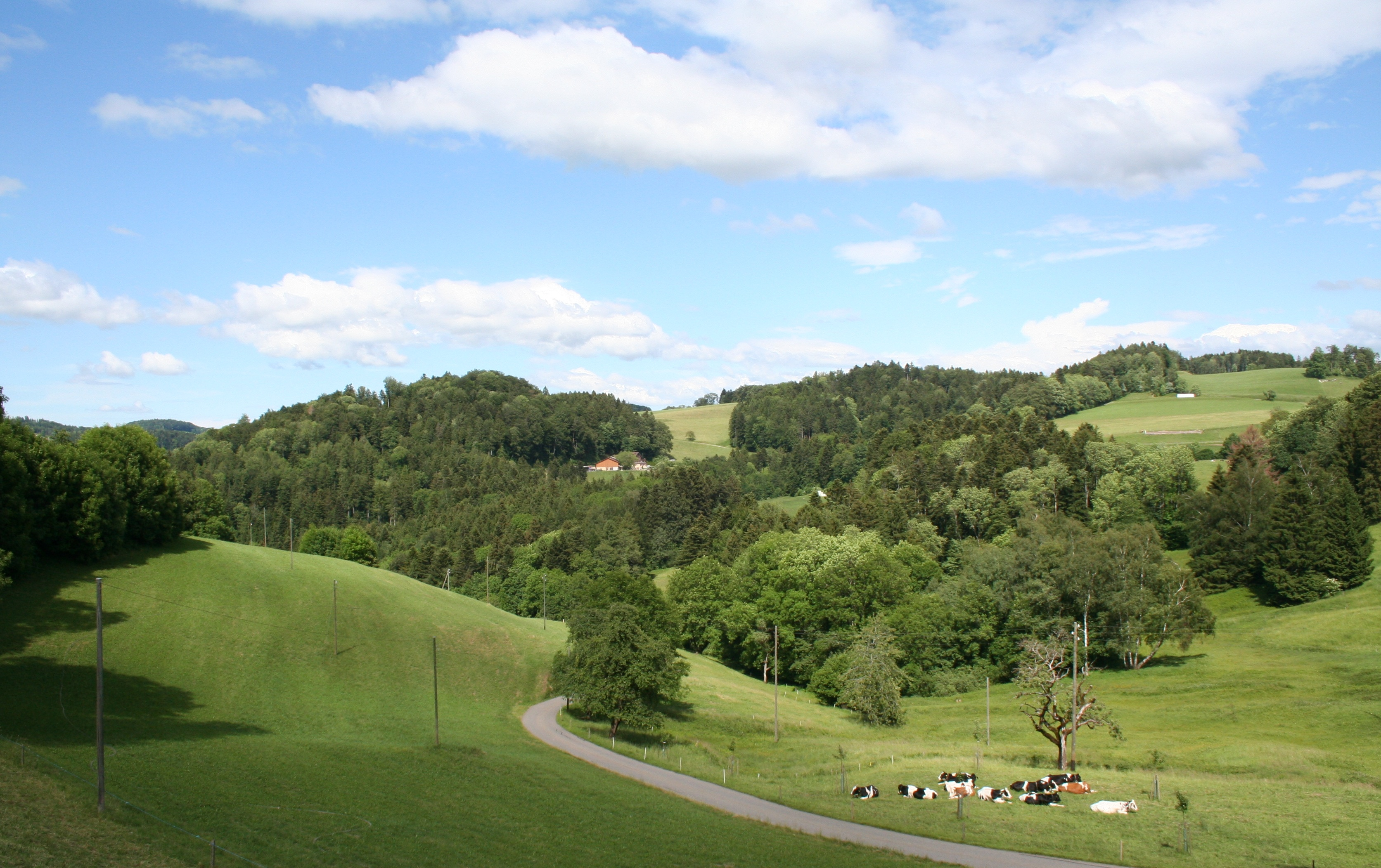 Im Zürcher Oberland. Typische Gegend bei Turbenthal